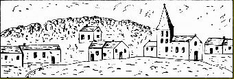 Jean Bertels, Skizz vun der Steeseler Kierch (1571).